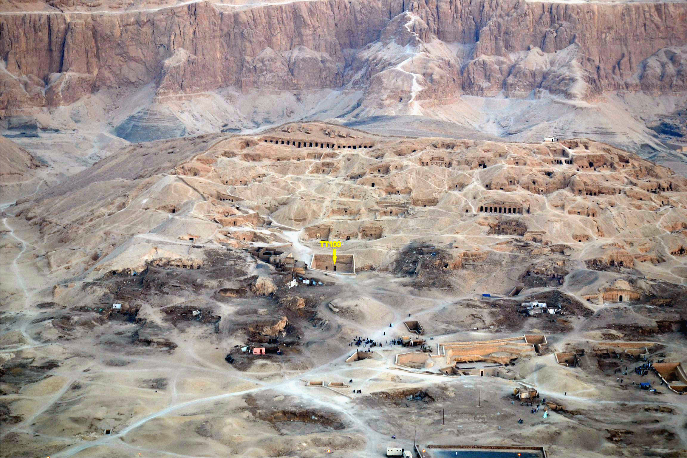 A TT100 Rehmiré sírja (Luxor, Egyiptom)